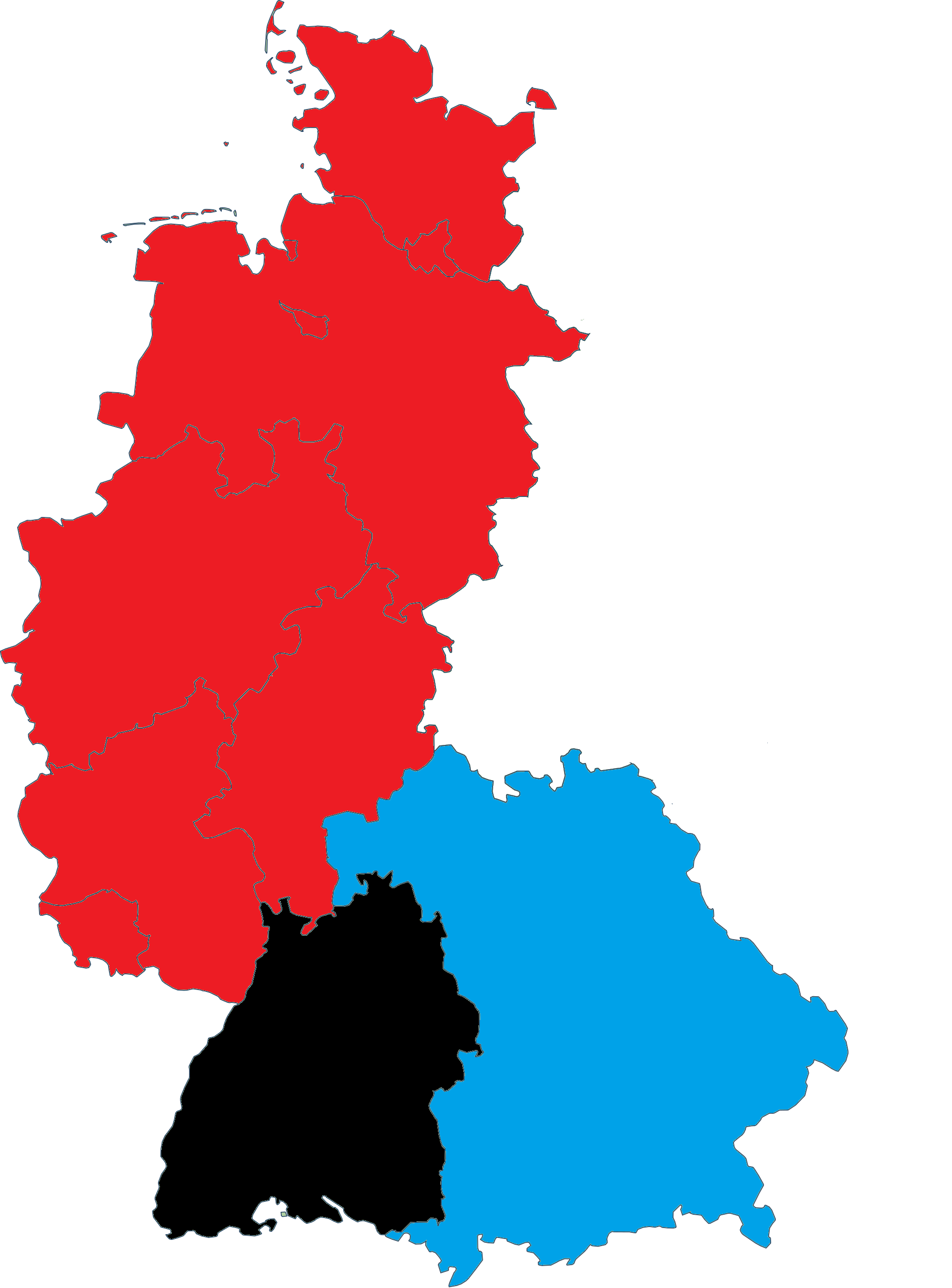 Elections européennes de 1989 en Allemagne, parti arrivé en tête par Land. Rouge : SPD Noir : CDU Bleu : CSU